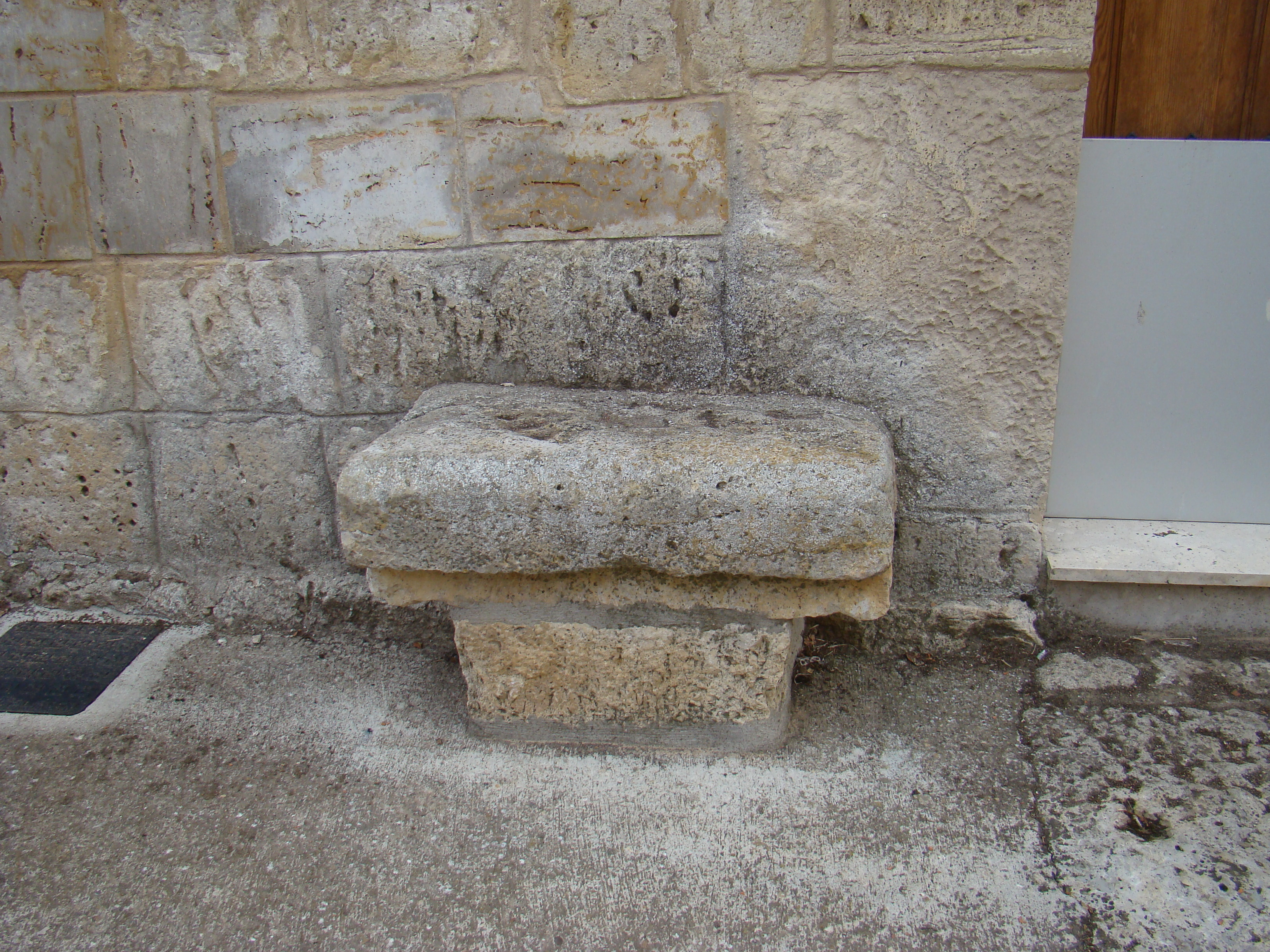 Castromonte, provincia de Valladolid, España. Arquitectura popular. Bancos de piedra colocados siempre junto a una puerta y en la fachada de la casa. Se llaman poyo.